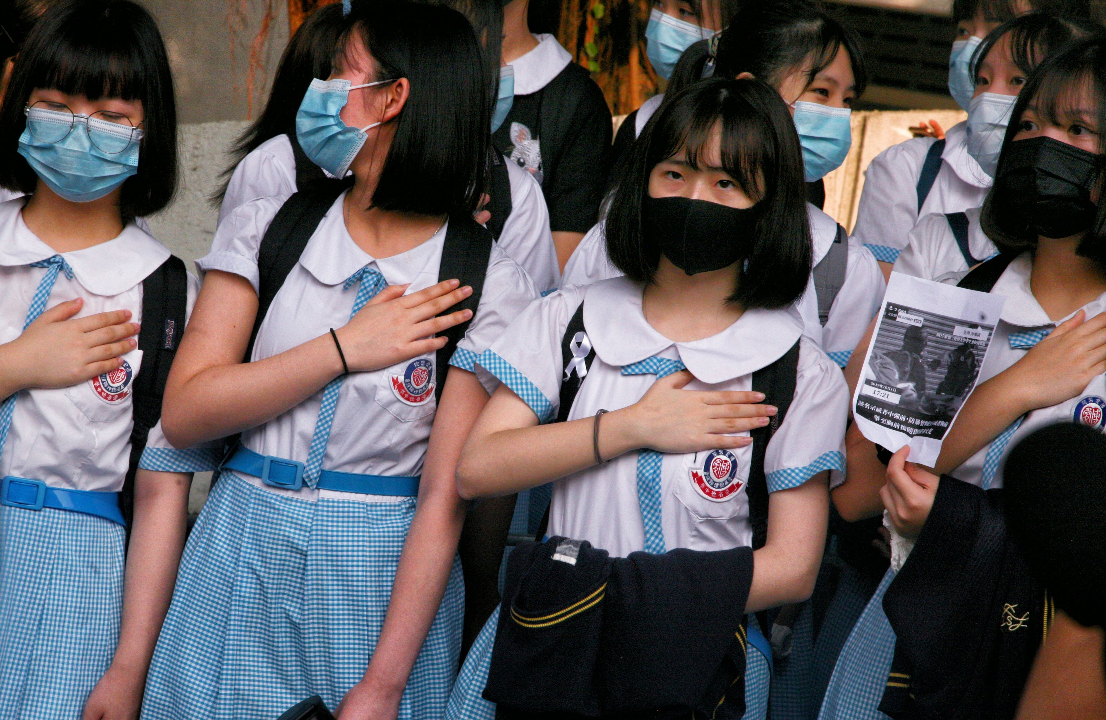 粵語: 二零一九年十月二號，有梁省德中學嘅學生，喺何傳耀中學出面，將手放喺心口，抗議警察用子彈射傷學生心口。